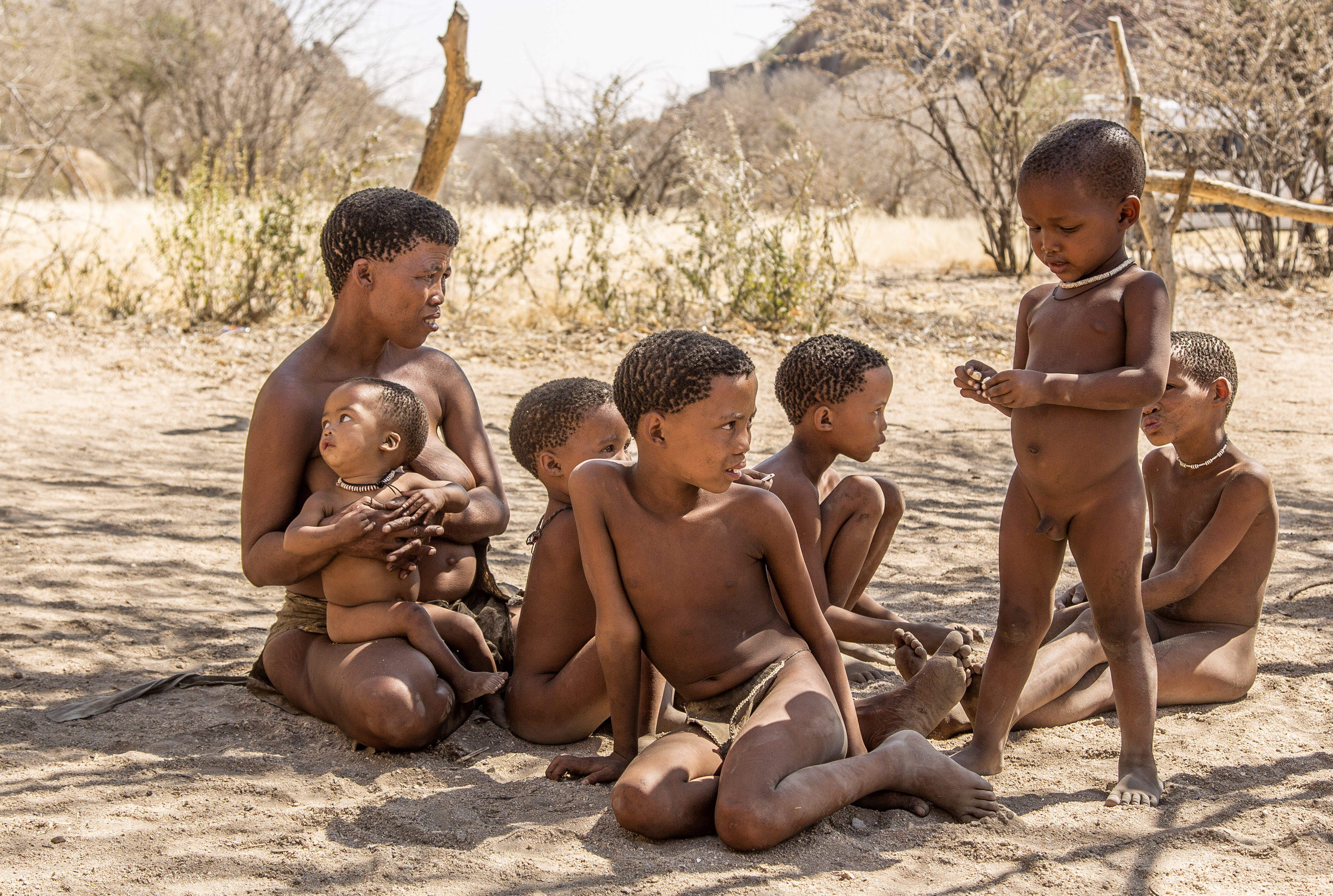 Kinder von Buschmännern in Namibia